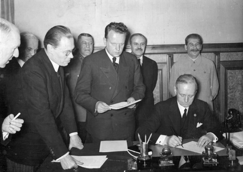 Dtsch.-Sowjet. Grenz- u. Freundschaftsvertrag Scherl: Die Unterzeichnung in Moskau. Als Ergebnis der Moskauer Besprechungen wurde vom Reichsminister des Auswärtigen v. Ribbentrop und vom Vorsitzenden des Rates der Volkskommissare und Außenkommissar Molotow im Kreml eine gemeinsame politische Erklärung und der Freundschaftsvertrag zwischen der Reichsregierung und der Regierung der UdSSR unterzeichnet. Unser Bild zeigt Reichsaußenminister v. Ribbentrop während der Unterzeichnung. Links neben ihm der sowjetrussische Botschafter in Berlin Schkarzew; dahinter (von rechts) Stalin, Außenkommissar Molotow und der Generalstabschef der sowjetrussischen Armee Stapostnikow. ADN-ZB/Archiv Sowjetunion, September 1939 In Moskau wird am 28.9.1939 zwischen dem Deutschen Reich und der UdSSR ein Grenz- und Freundschaftsvertrag sowie eine gemeinsame politische Erklärung unterzeichnet. Der deutsche Reichsaußenminister Joachim von Ribbentrop während der Unterzeichnung; stehend v.r. J. W. Stalin, der Vorsitzende des Rates der Volkskommissare W. M. Molotow, der sowjetische Botschafter in Berlin Schkwarzew und der sowjetische Generalstabschef B. M. Schaposchnikow. 11983-39 Abgebildete Personen: Ribbentrop, Joachim von: Außenminister, NSDAP, Deutschland Molotow, Wjatscheslaw Michailowitsch: Außenminister, Sowjetunion (GND 11873461X) Schkwarzew, Alexander: Botschafter in Deutschland, Sowjetunion Schaposchnikow, Boris: Marschall, Sowjetunion (GND 11882600X) Stalin, Josef W.: 1878-1953; Marschall, Vorsitzender des Ministerrates, Generalsekretär der KP, Sowjetunion (GND 118642499) Information added by Wikimedia users. Außerdem im Bild: Friedrich Gaus (ganz links vorne; Leiter der Rechtsabteilung des Auswärtigen Amtes), Graf von der Schulenburg (Hintergrund links neben Schaposchnikow; deutscher Botschafter in Moskau) und Gustav Hilger (vorne rechts von Gaus; Botschaftsrat an der deutschen Botschaft in Moskau).